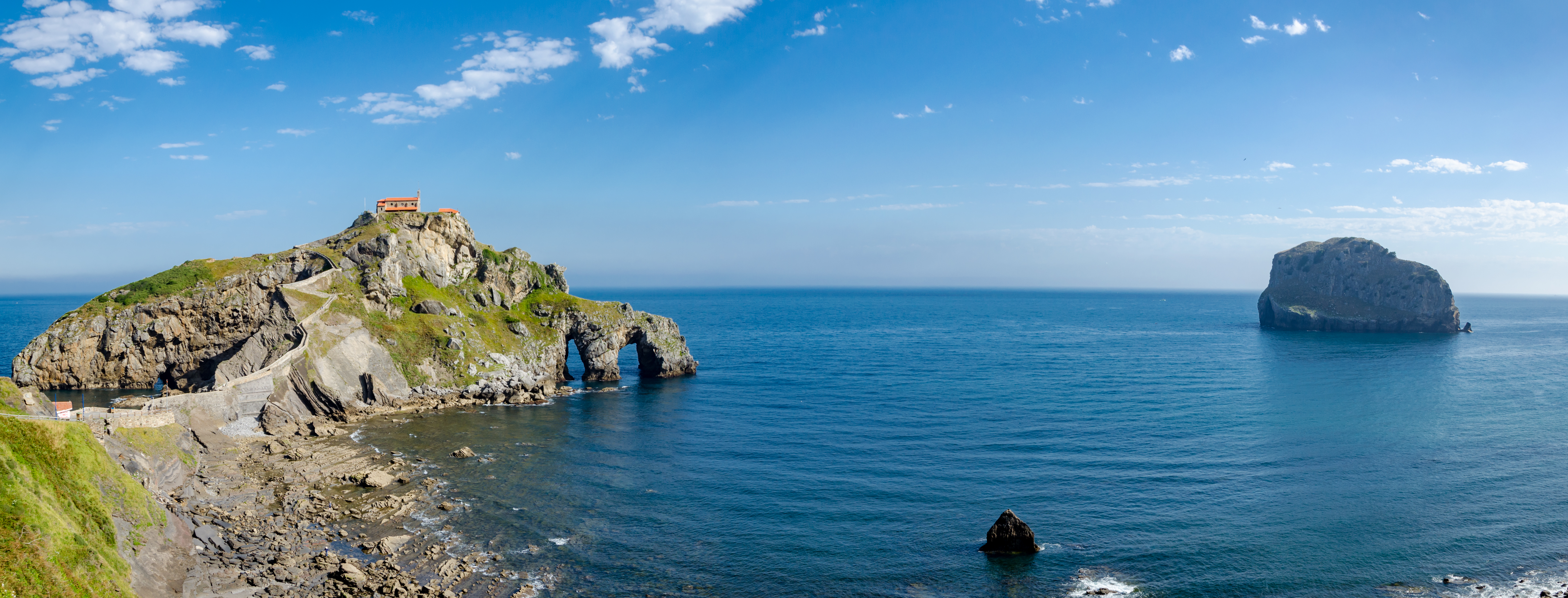 Gaztelugatxe junto a la isla Aquech.